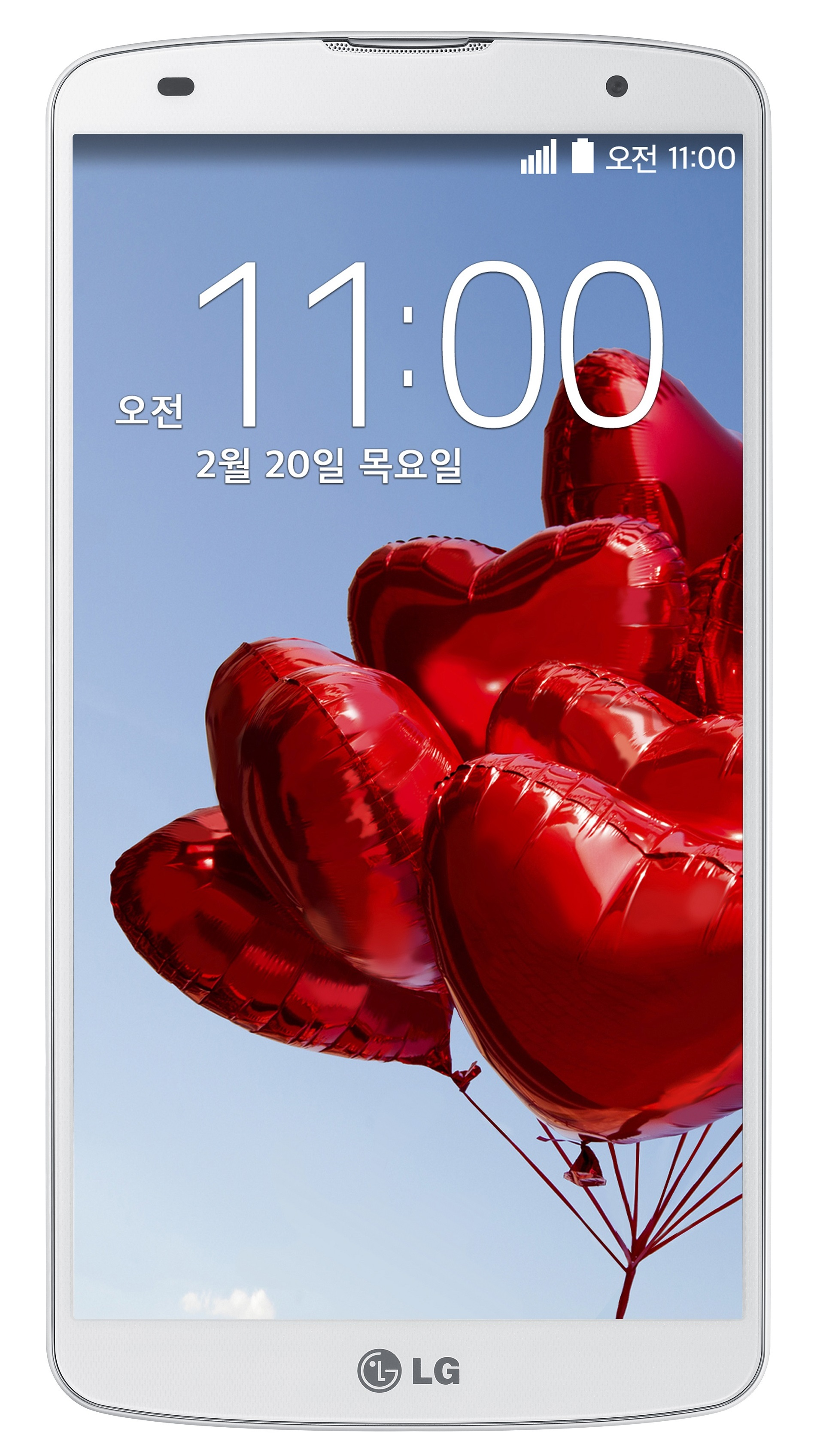 대화면 G시리즈 ‘LG G프로2’ 제품 사진. ※ Social LG전자 에서 관련 보도자료를 확인하실 수 있습니다.